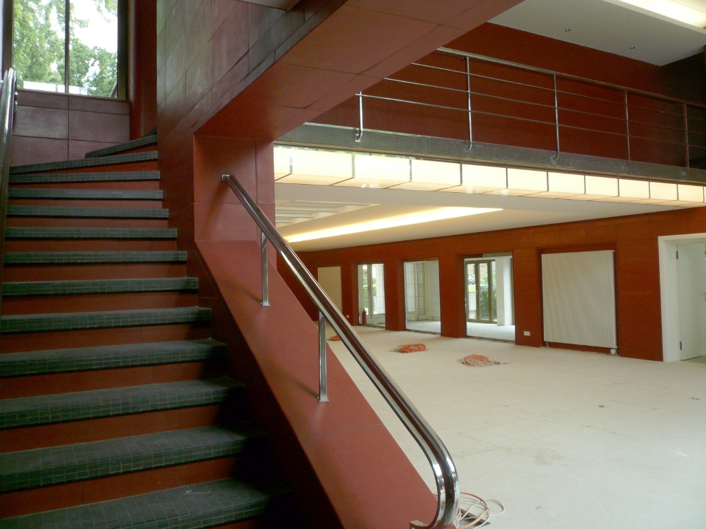 Haus K. in O. -Villa Reemtsma - in Hamburg Othmarschen: Schwimmehalle (innen)